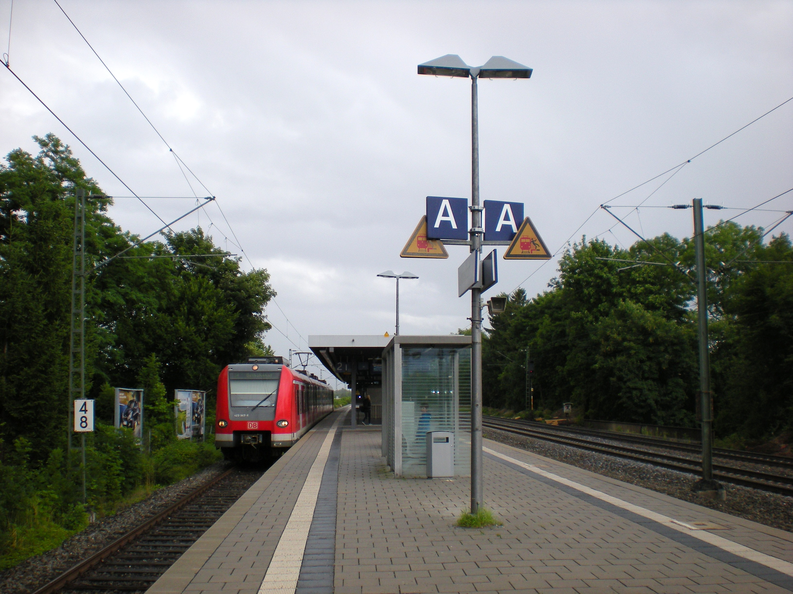 Bahnsteig des S-Bahnhofs Gronsdorf mit S4 zum Münchner Ostbahnhof